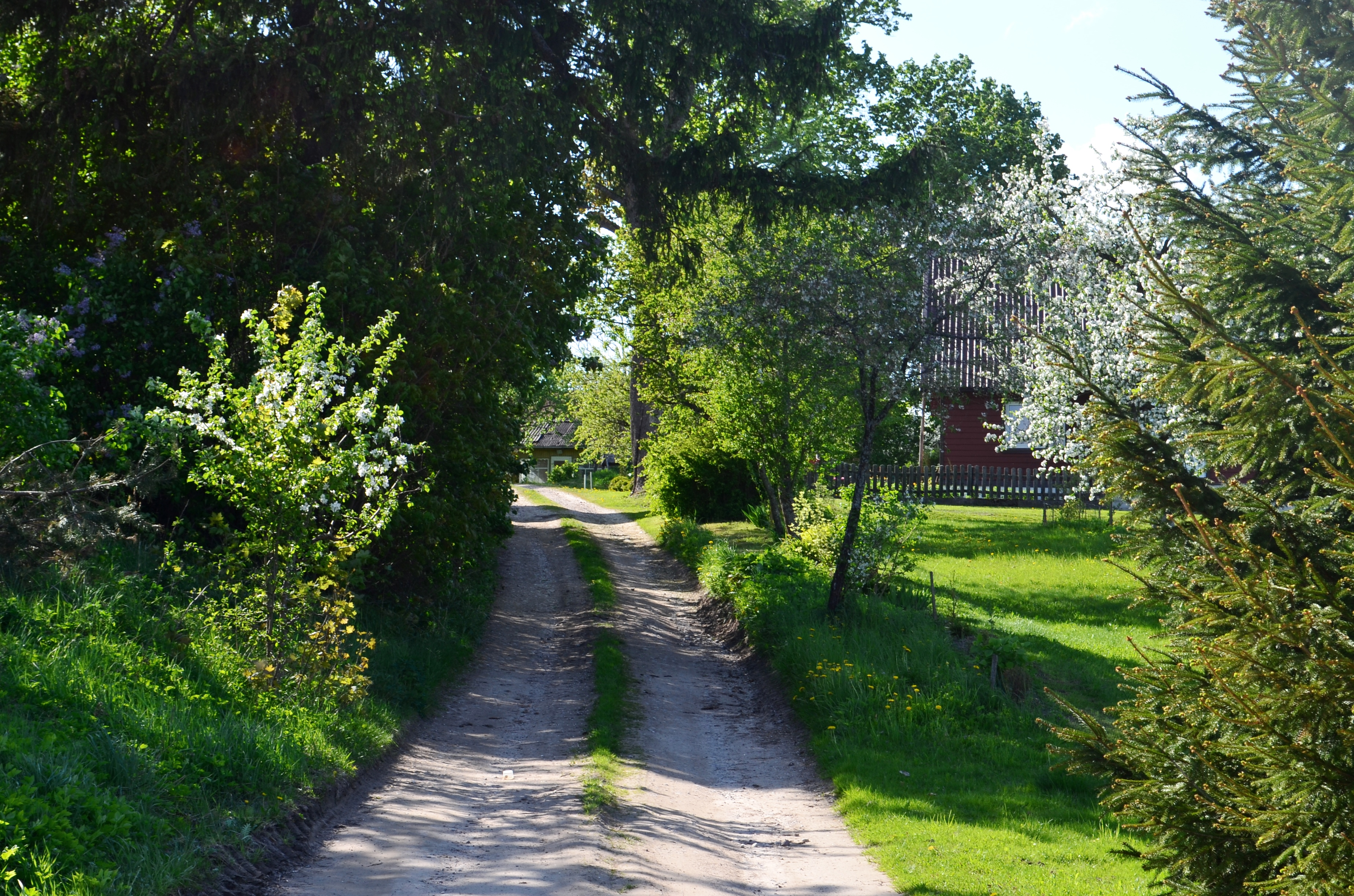 Skardžiai, Joniškio sen., Molėtų raj.